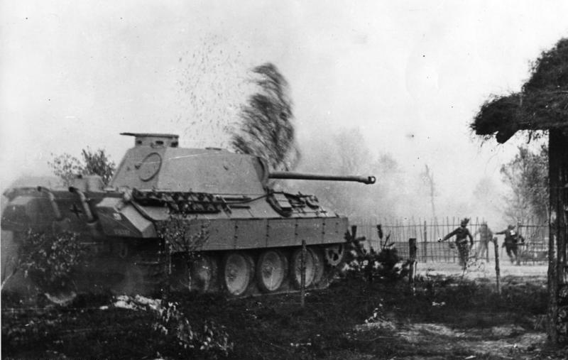 "Panther und Füsiliere stürmen" Unter dem Feuerschutz der neuen deutschen "Panther"- Panzer, kämpfen sich Panzerfüsiliere der Division "Großdeutschland" immer weiter durch ein von Sowjets besetztes Dorf im Süden der Ostfront hindurch. Aufnahme: PK-Müller Transocean-Europaexpress